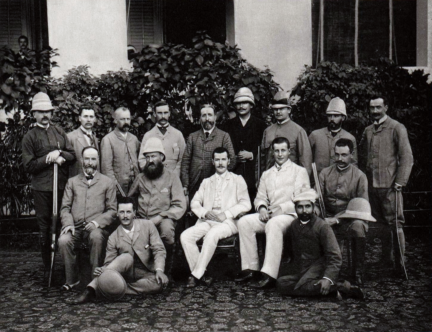 Цесаревич Николай Александрович во время Восточного путешествия. Мадрас, 1890 год. Стоят (слева направо): полковник Джерард Гардинг доктор Рамбах поручик Ньюнхэм Мэкензи Уоллес Князь Кочубей Князь Оболенский Князь Ухтомский Капитан Гровер Сидят (слева направо): М.К. Ону Князь Барятинский Е.И.В. Наследник Цесаревич Николай Александрович Е.К.В. Принц Греческий Е.Н. Волков Сидят на земле (слева направо): Гриценко Мунши Азизуддин